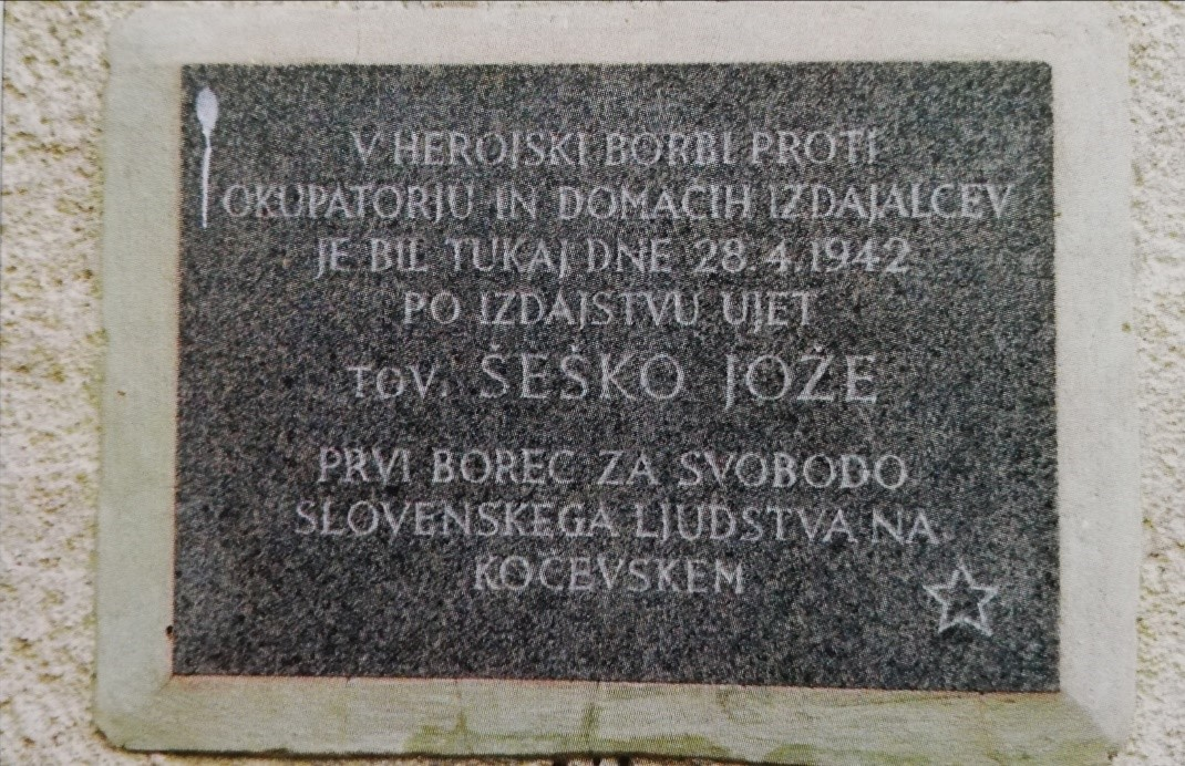 Ploča